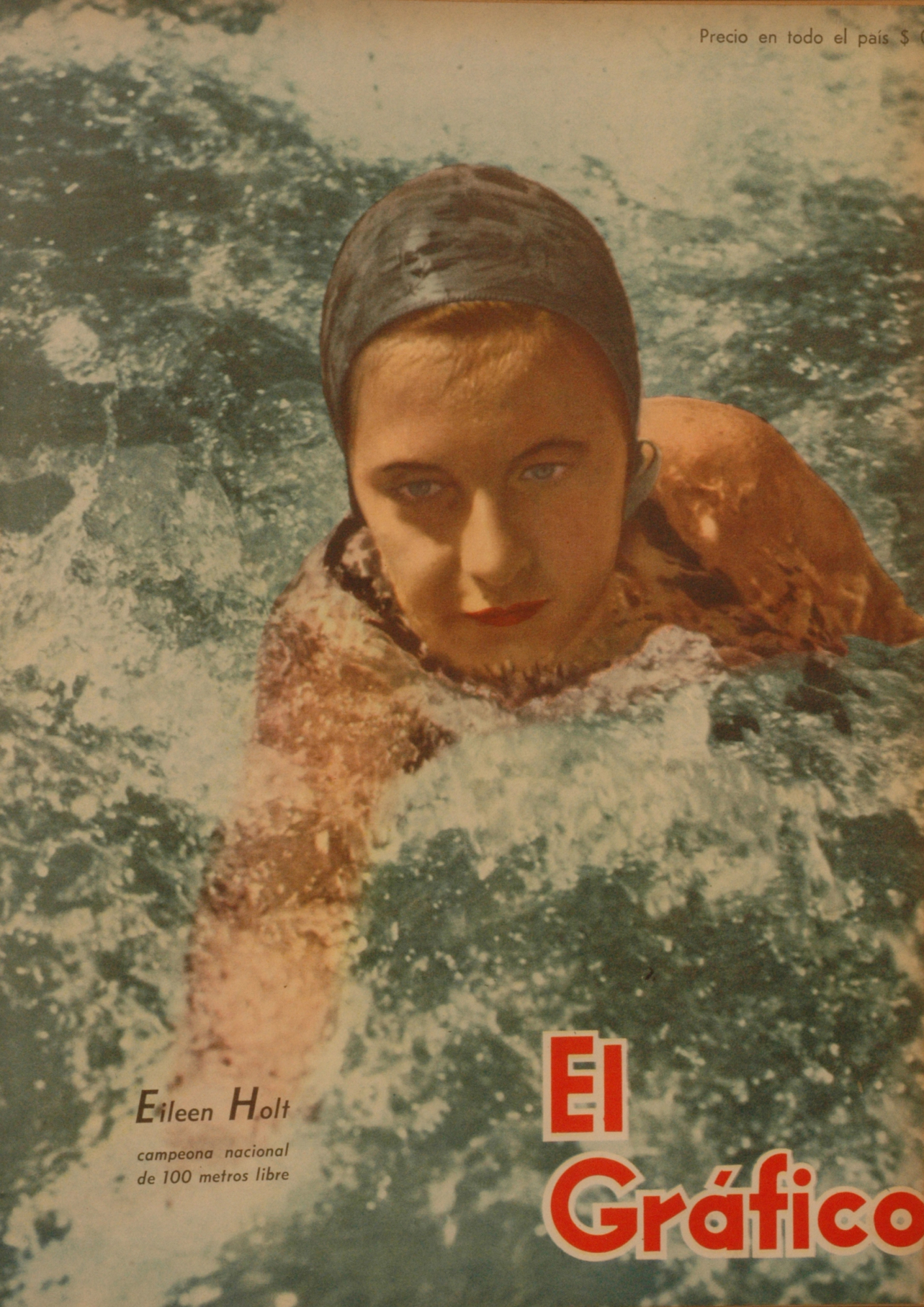 El Grafico del 03 de Mayo de 1946. Edicion 1399